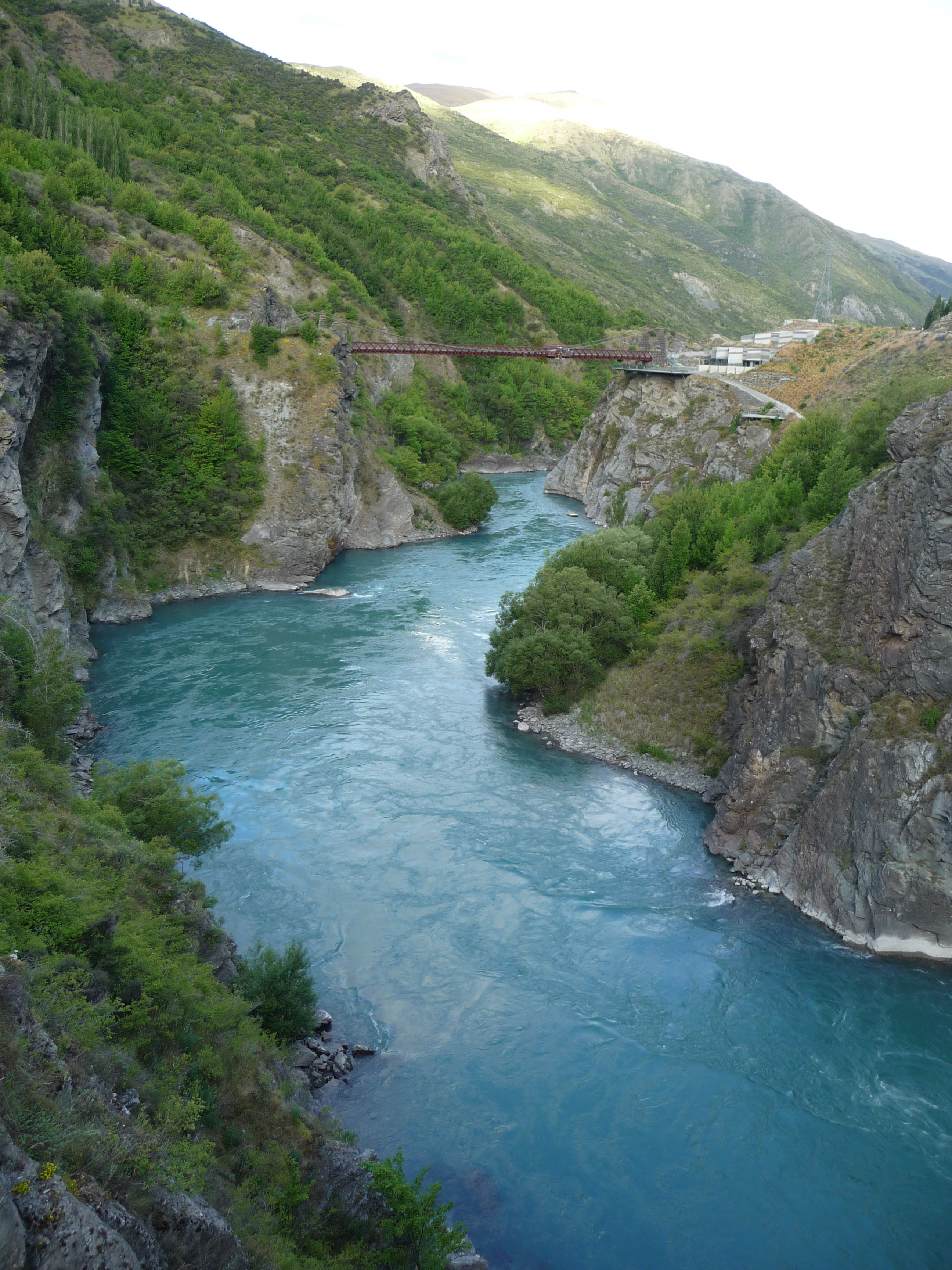 Kawarau River Bridge